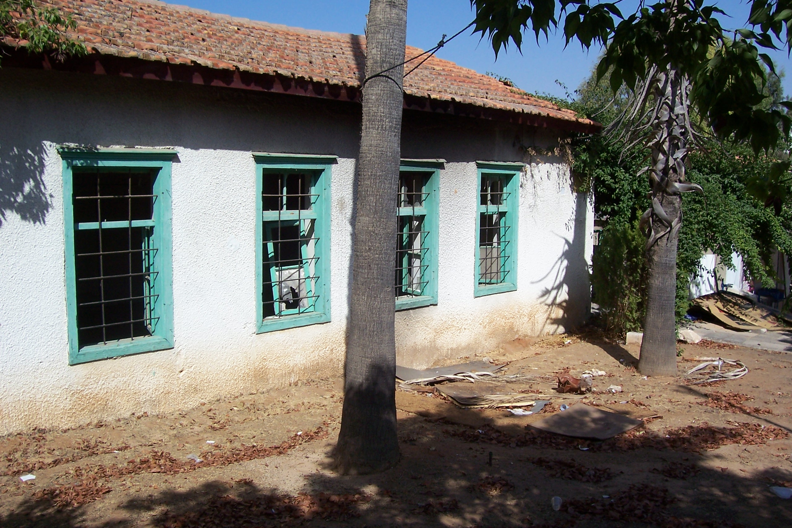 בית פוקס - גדרה